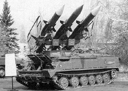 SA-6 (2K12 Kub 2P25 TEL)